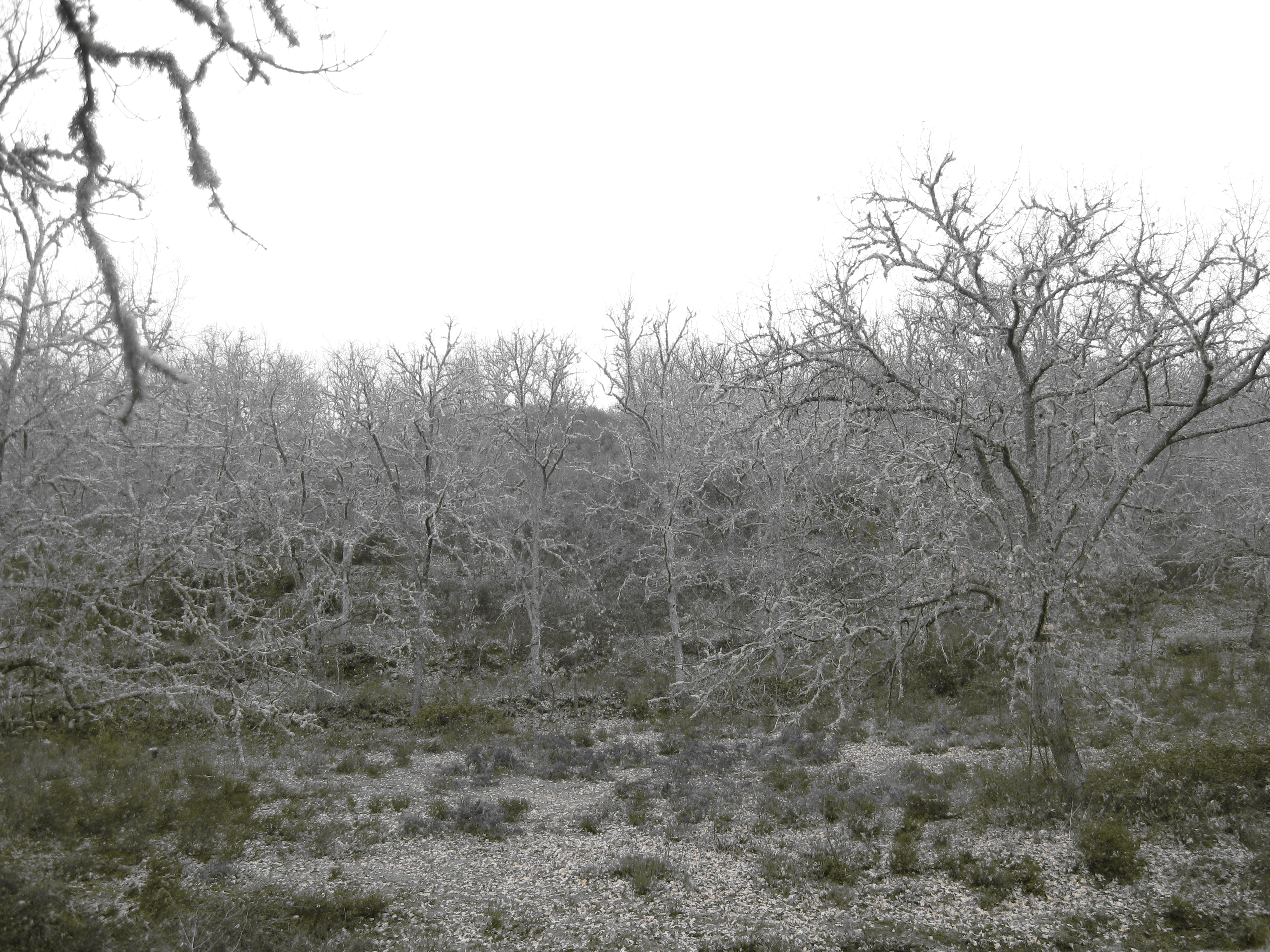 Líquenes en el robledal cerca de Valfrío. Enero de 2013